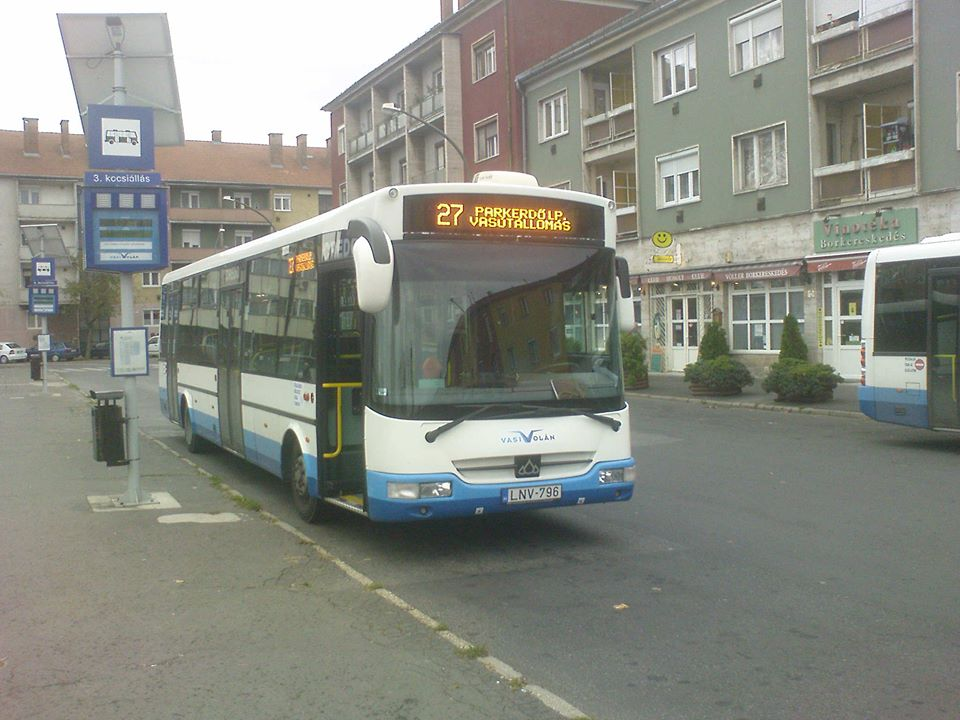 A 27-es busz Szombathelyen (Vas megye, Magyarország)